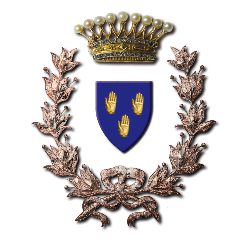 armoiries de la famille Racine de Beaulieu